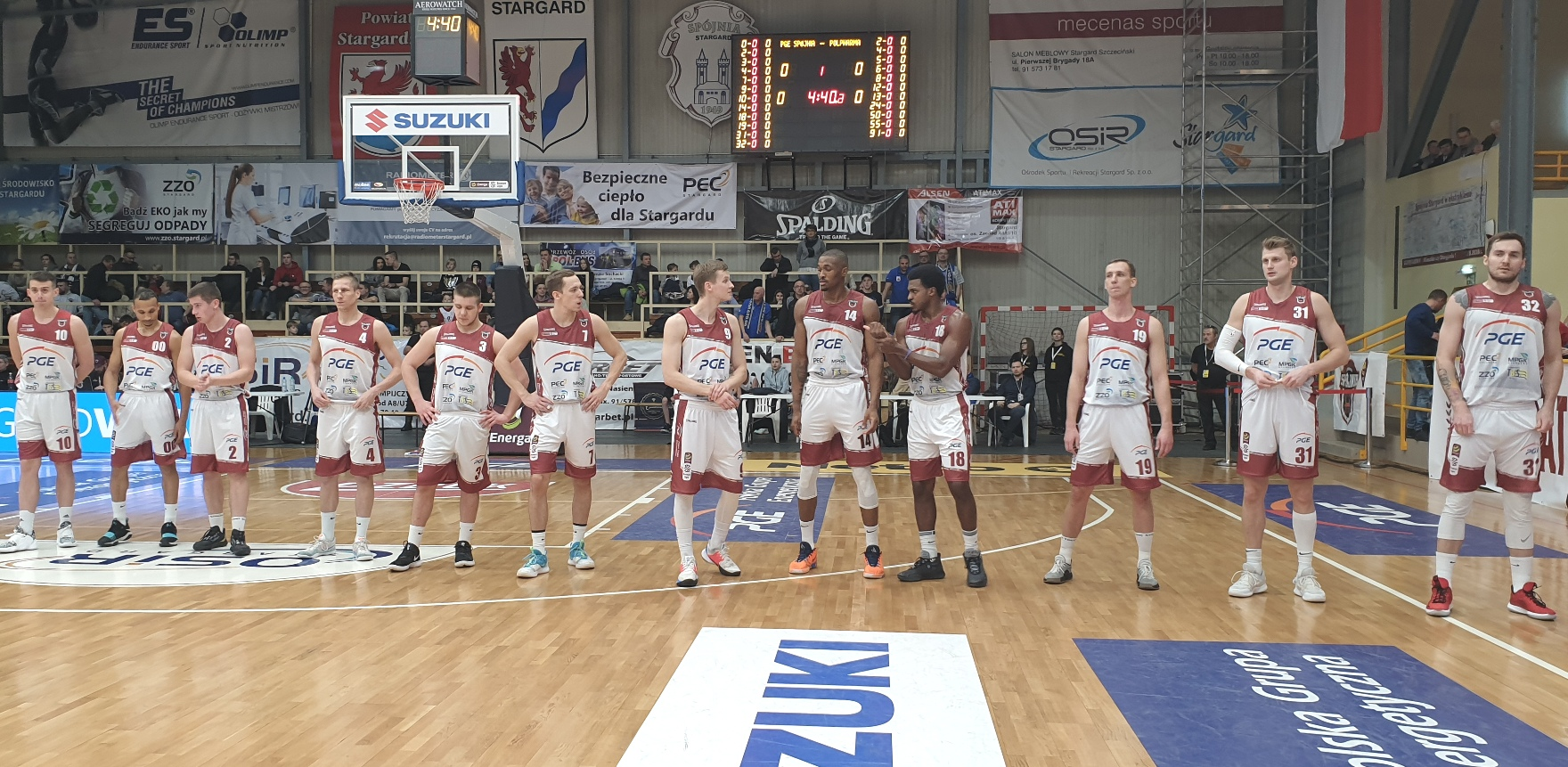 Stargard. Prezentacja PGE Spójnia 19.01.2020